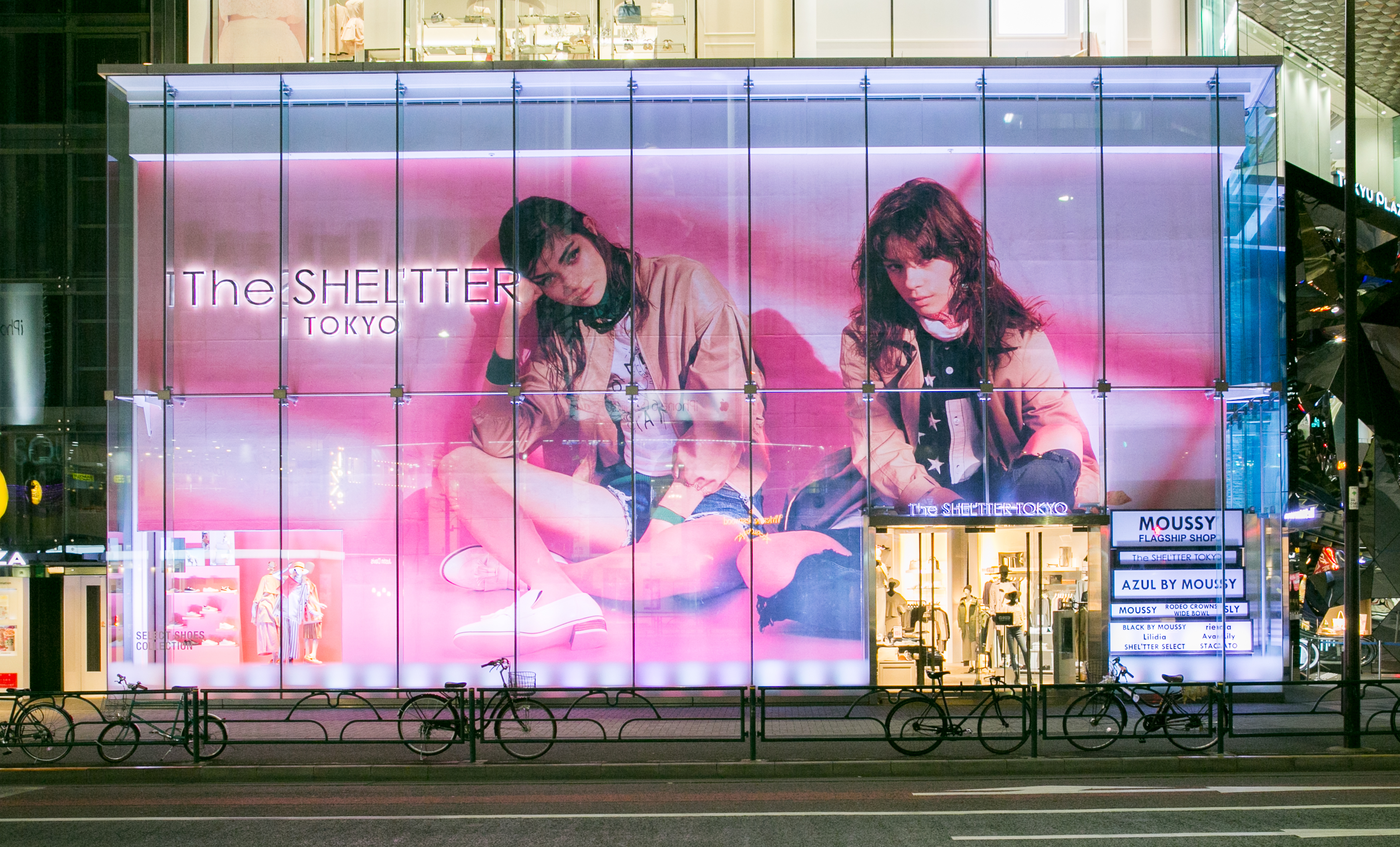 バロックジャパン旗艦店 The SHEL'TTER TOKYO表参道